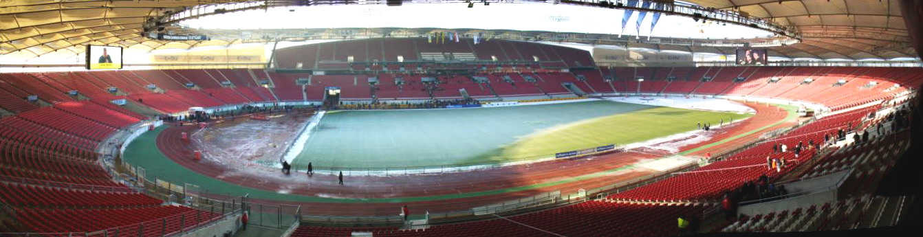 Stuttgart Gottlieb-Daimler-Stadion innen am Tag der offenen Tür 2006 selbst fotografiert am Tag der offenen Tür at 15 Jan 2006 von User:Enslin